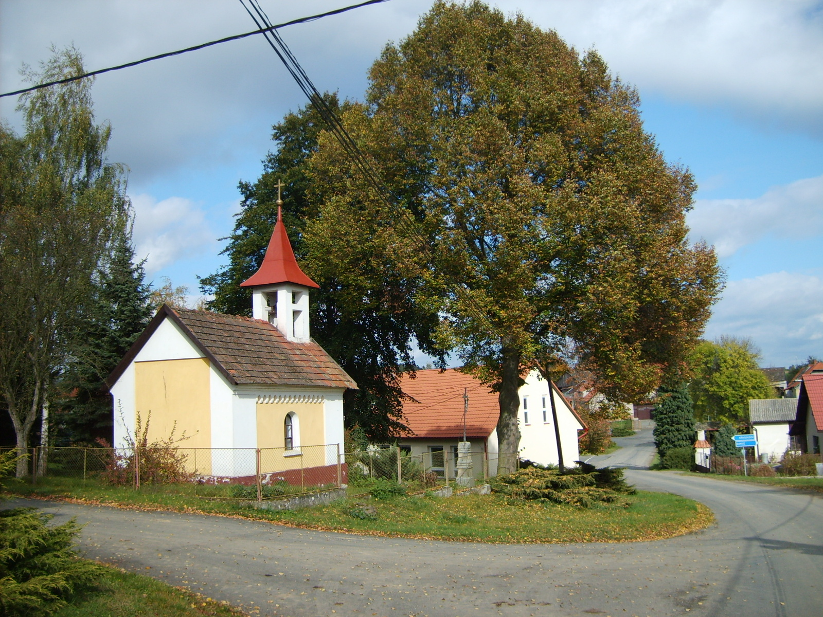 Chapelle in Studený, Czech rep.